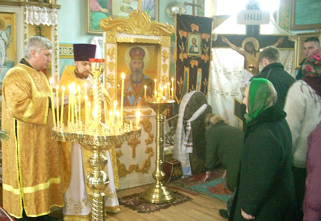 Чытанне акафісту ў Парыцкай царкве Св. роўнаапостальнай Марыі Магдаліны з нагоды ўсталявання Здудзіцкага каменнага крыжа